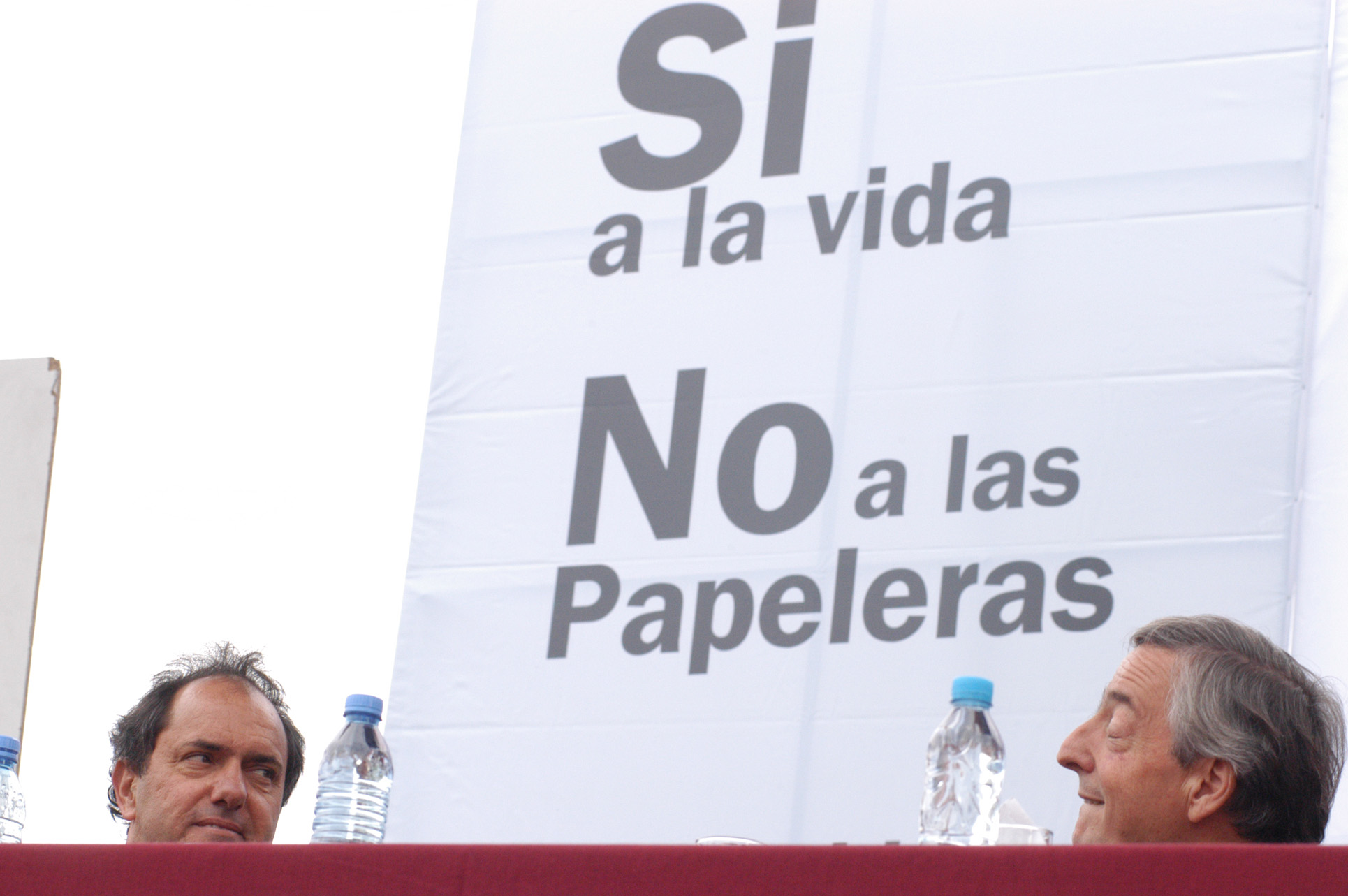 Kirchner y Scioli durante un acto de repudio a las papeleras.